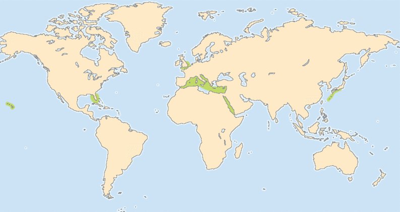 Mapa de distribución de Trichoplax adhaerens